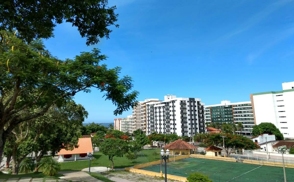 Esta imagem é do centro de Araruama, município localizado no estado do Rio de Janeiro. A imagem foi tirada pela manhã, diretamente da Praça do Centro.